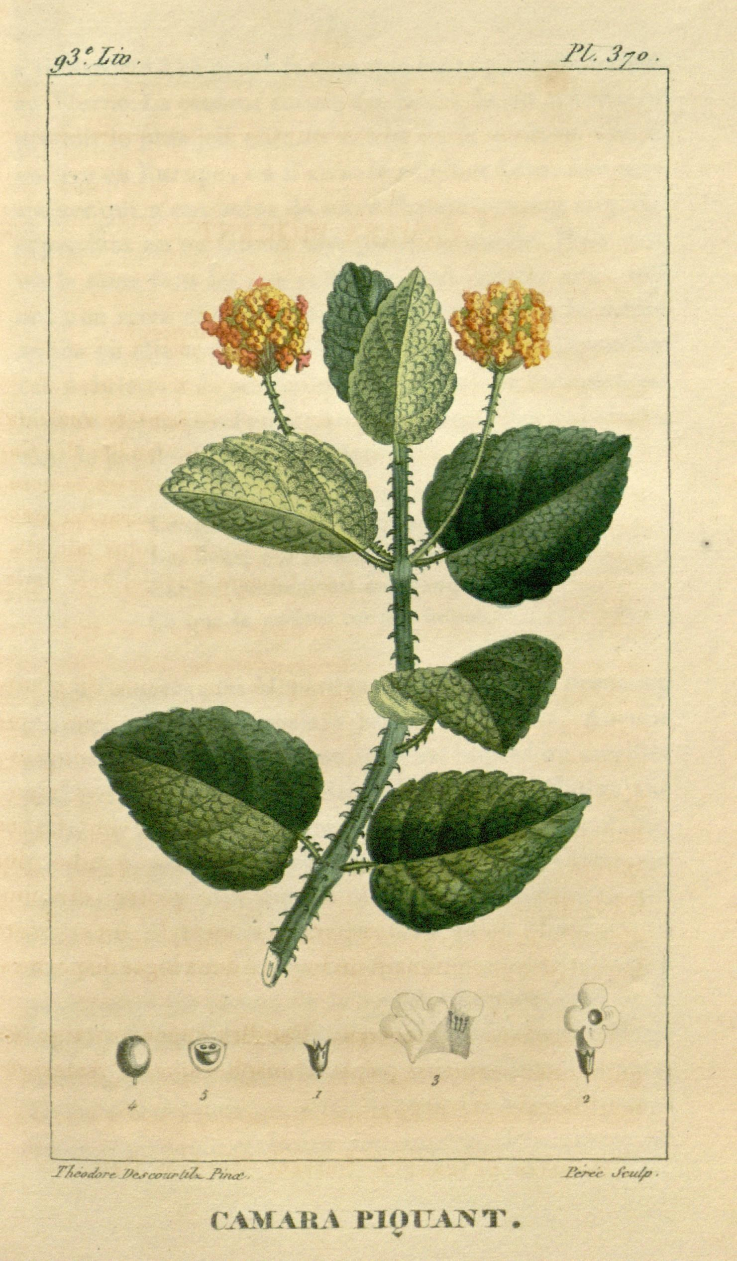 q3 tZm J.1. 3 70 L CAMARA PIOUANT.